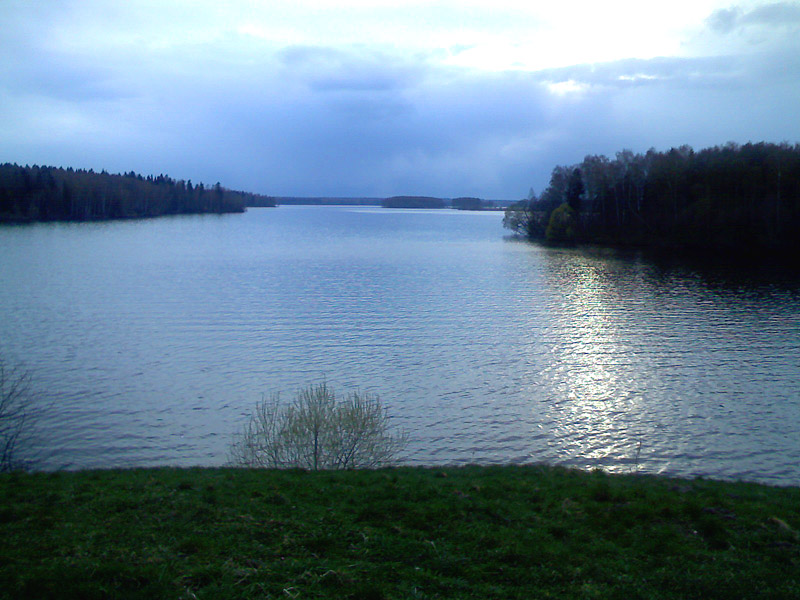 Пестовское водохранилище (близ дер. Тишково)